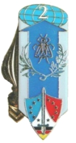 insigne régimentaire du 2eme GLCAT (de 1994 à 1999)